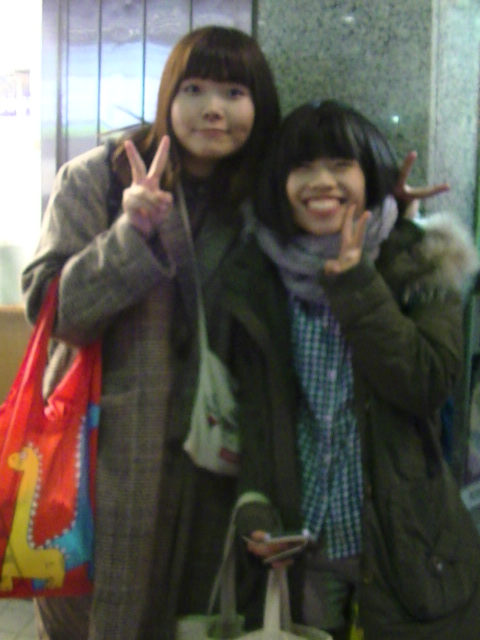 合わせみそ 2018年11月